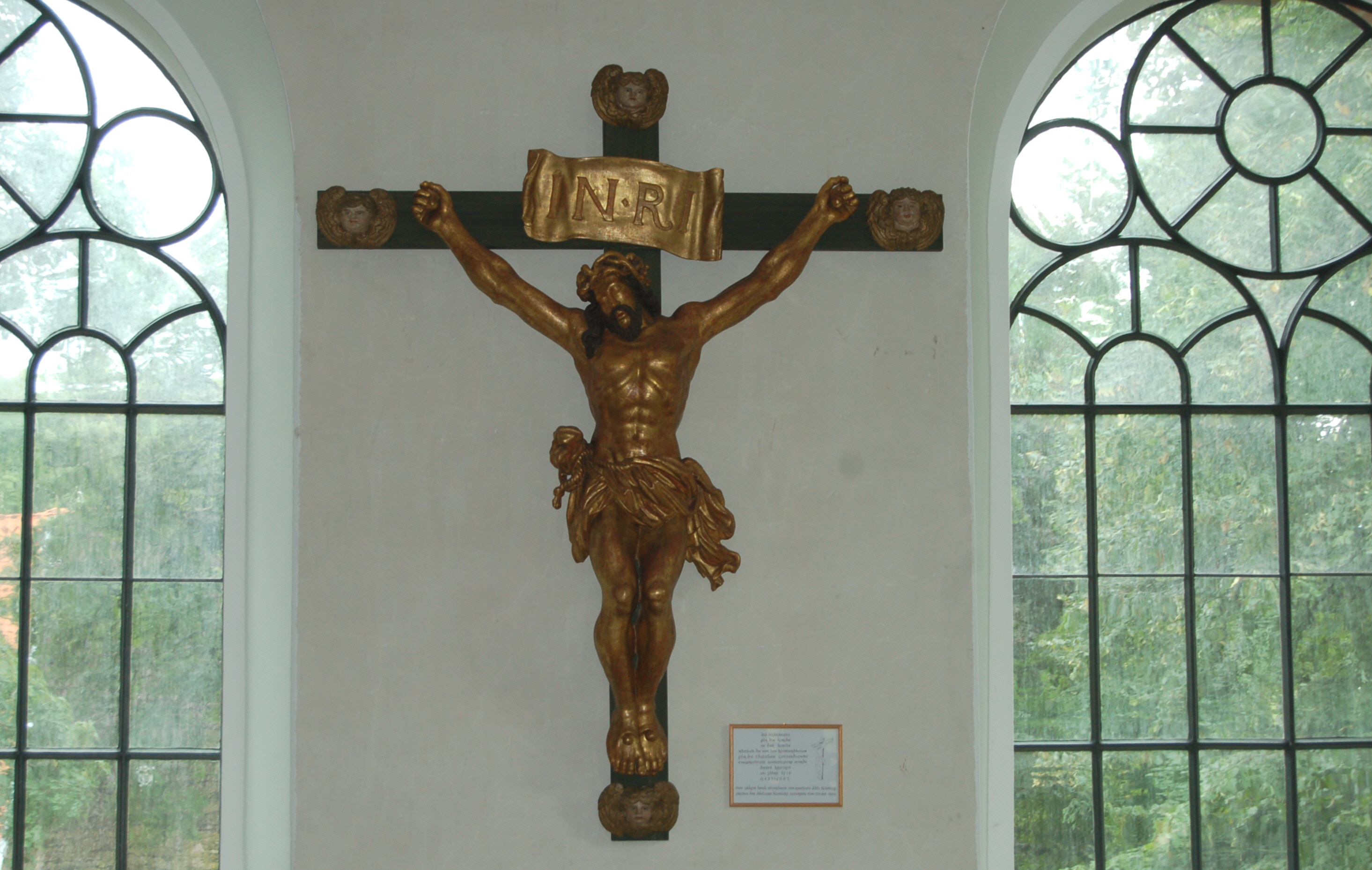 Kruzifix in der Klosterkirche Uetersen aus dem Jahre 1716